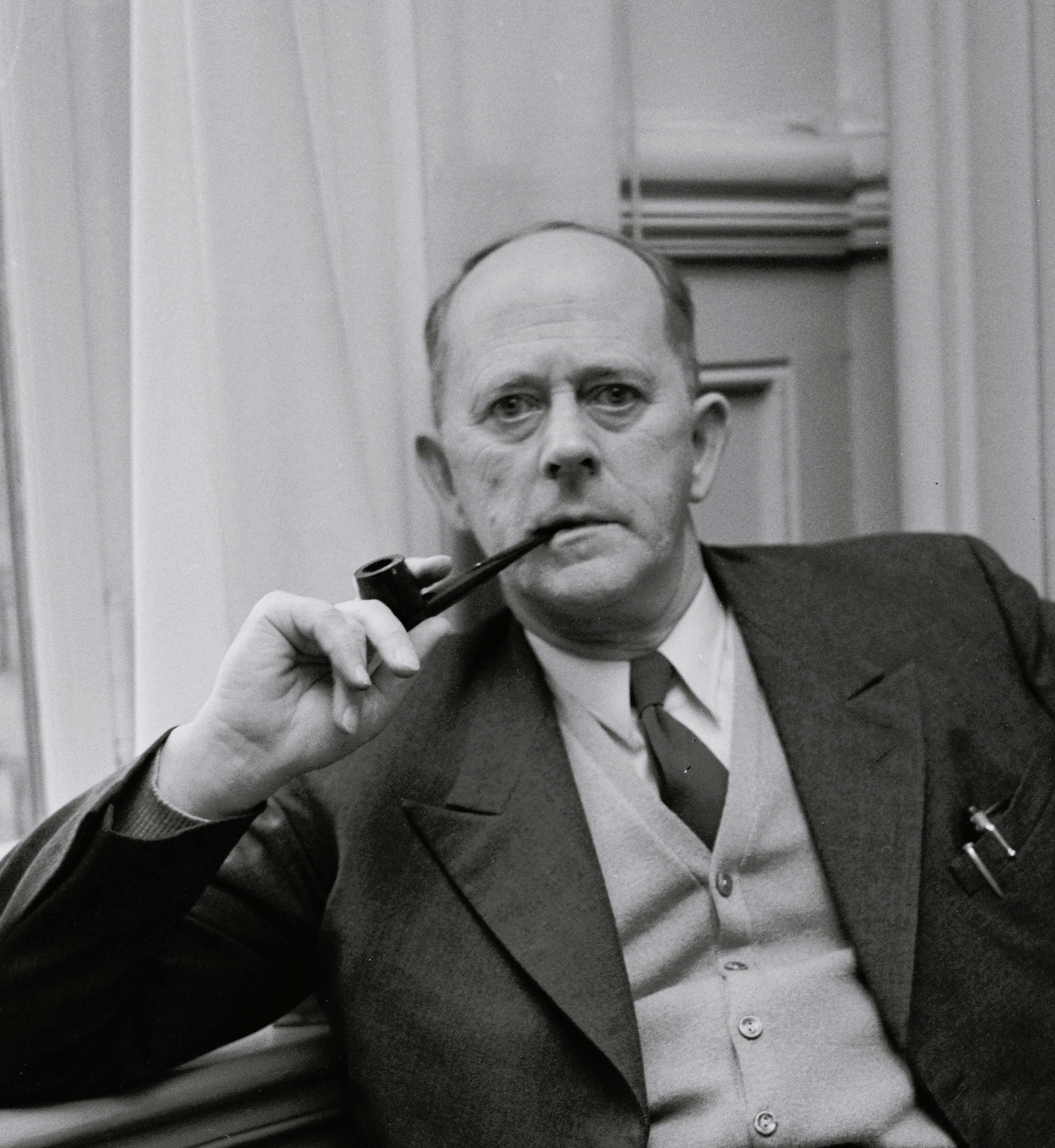 Bildet er hentet fra Arkivverket. Stortinget 1954. NÅ nr. 3, 1954. Arkivinstitusjon : Riksarkivet Arkivnavn : Billedbladet NÅ Sted : Norge, Oslo, Oslo, Stortinget Emneord: Stortinget, Menn Depicted person: Christian L. Holm